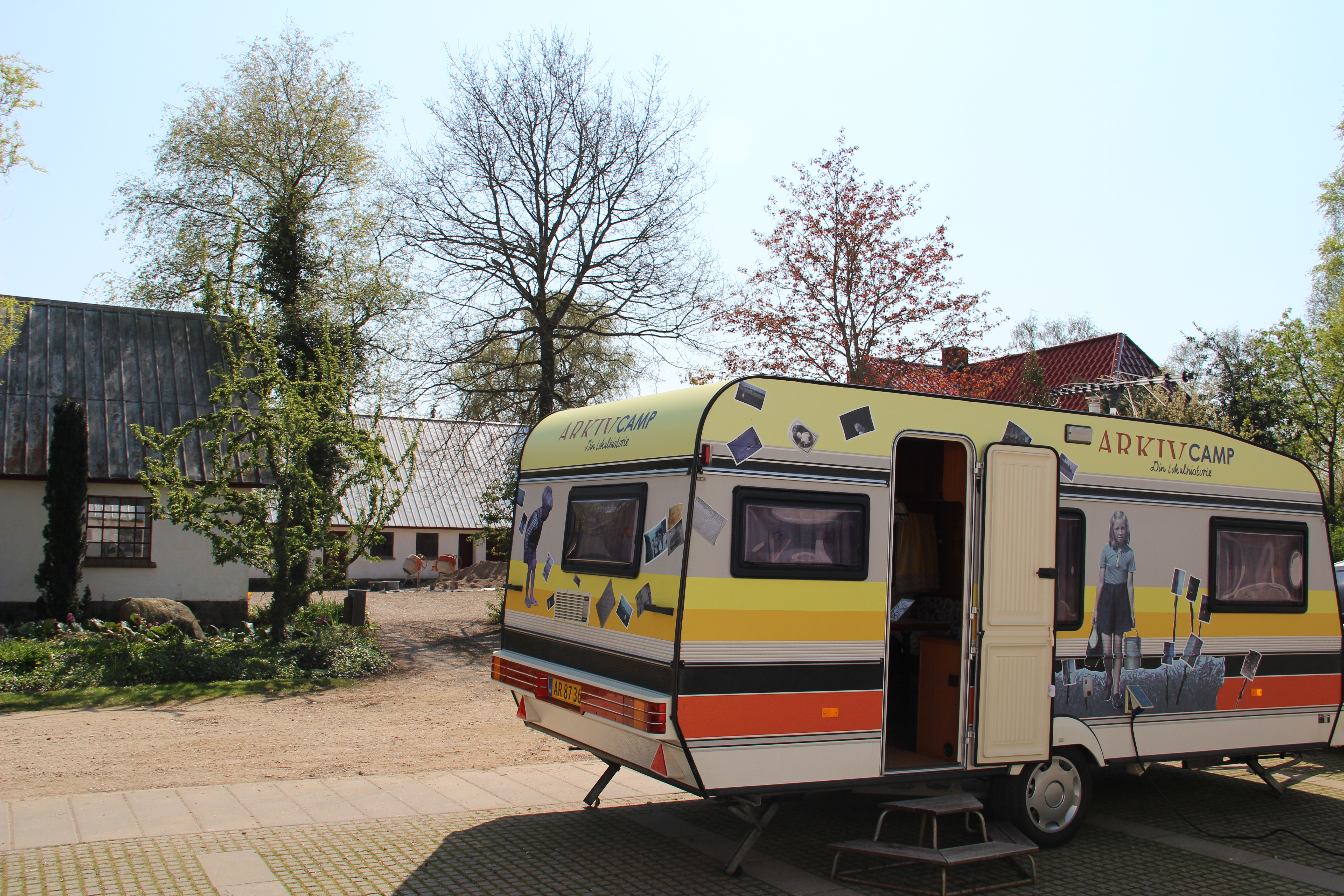 Kolding Stadsarkivs ARKIV CAMP - et rullende arkiv